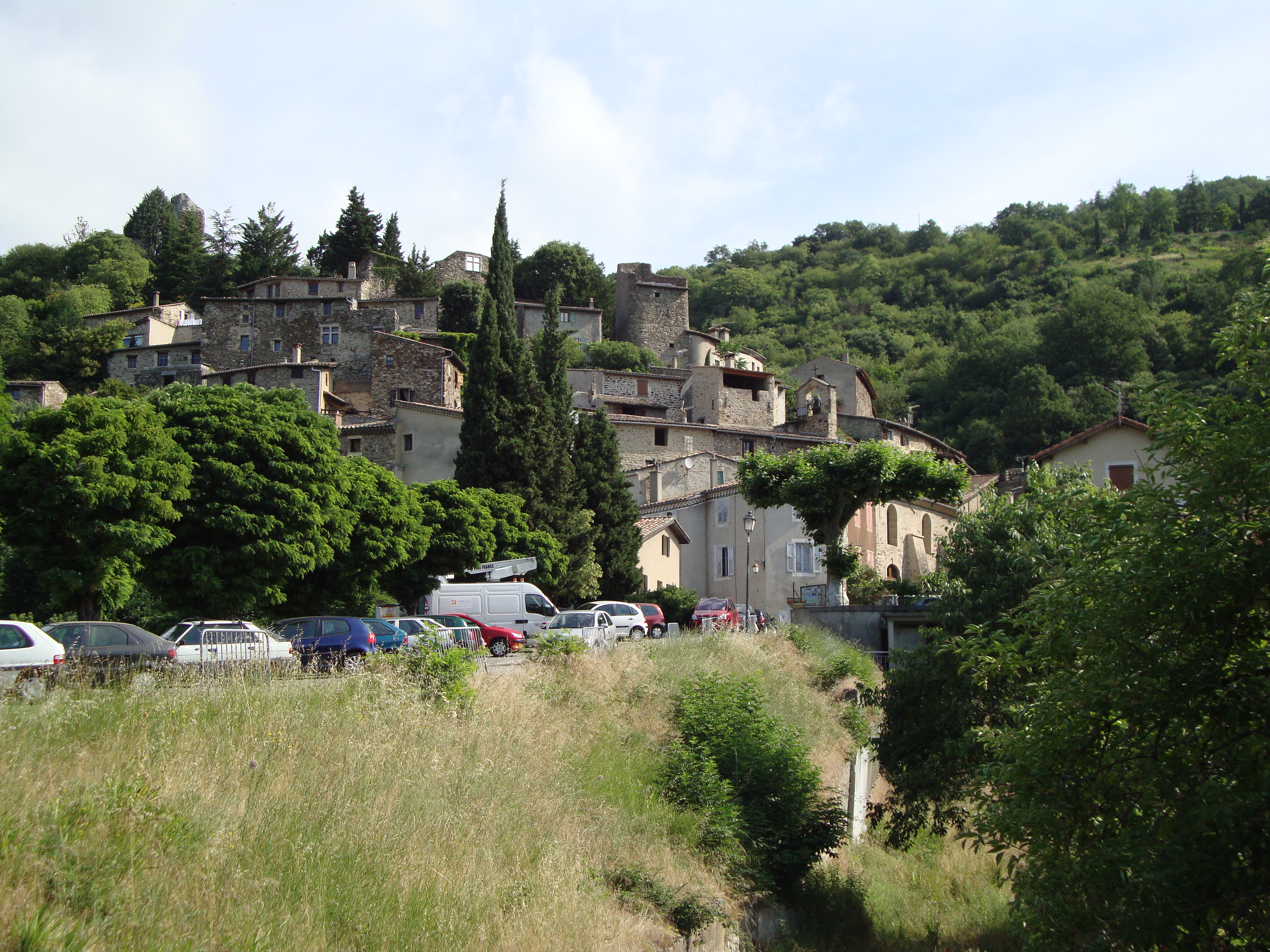 Beauchastel (Ardèche, Fr) vue du village.